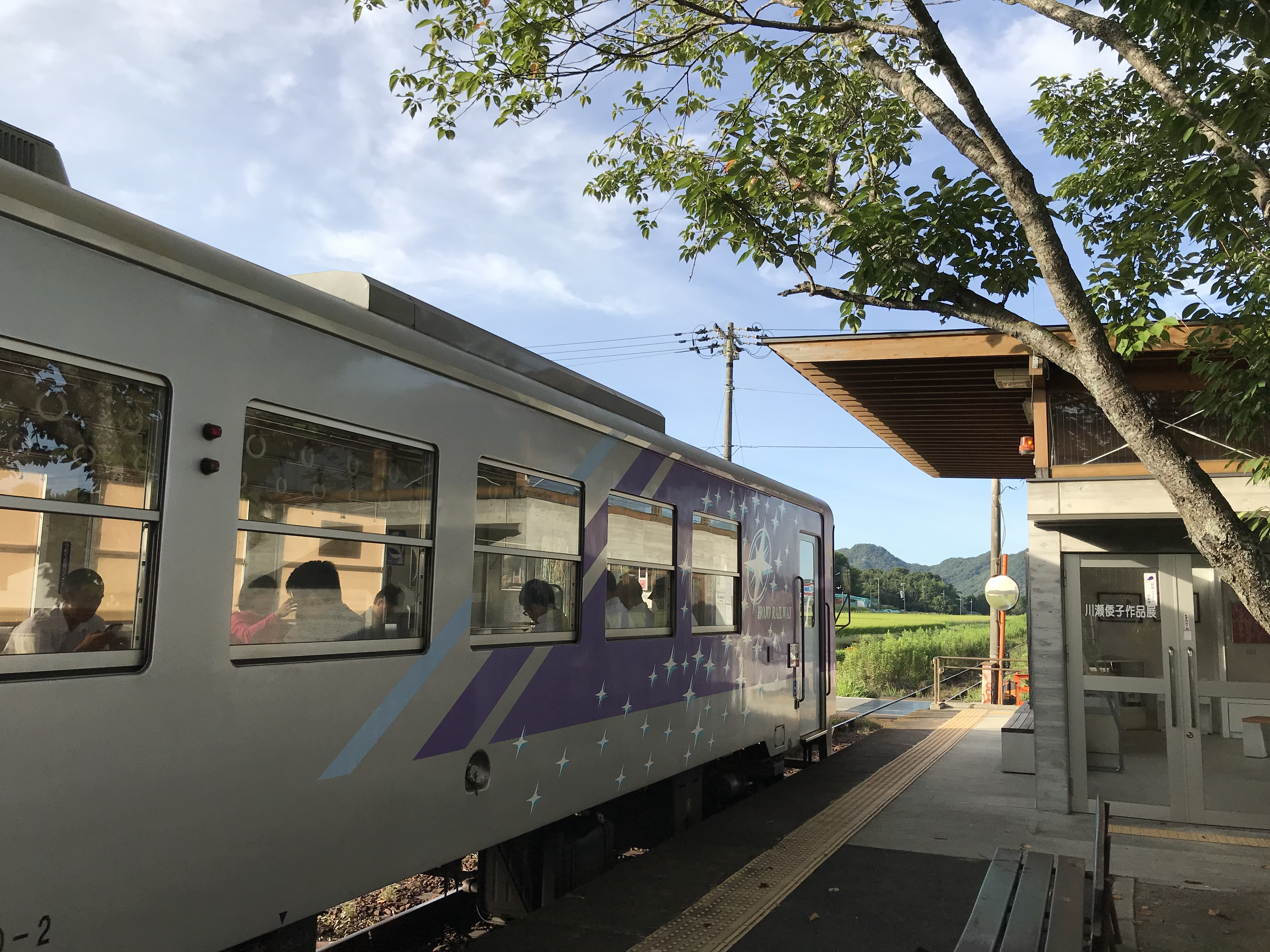 播磨横田駅に停車中